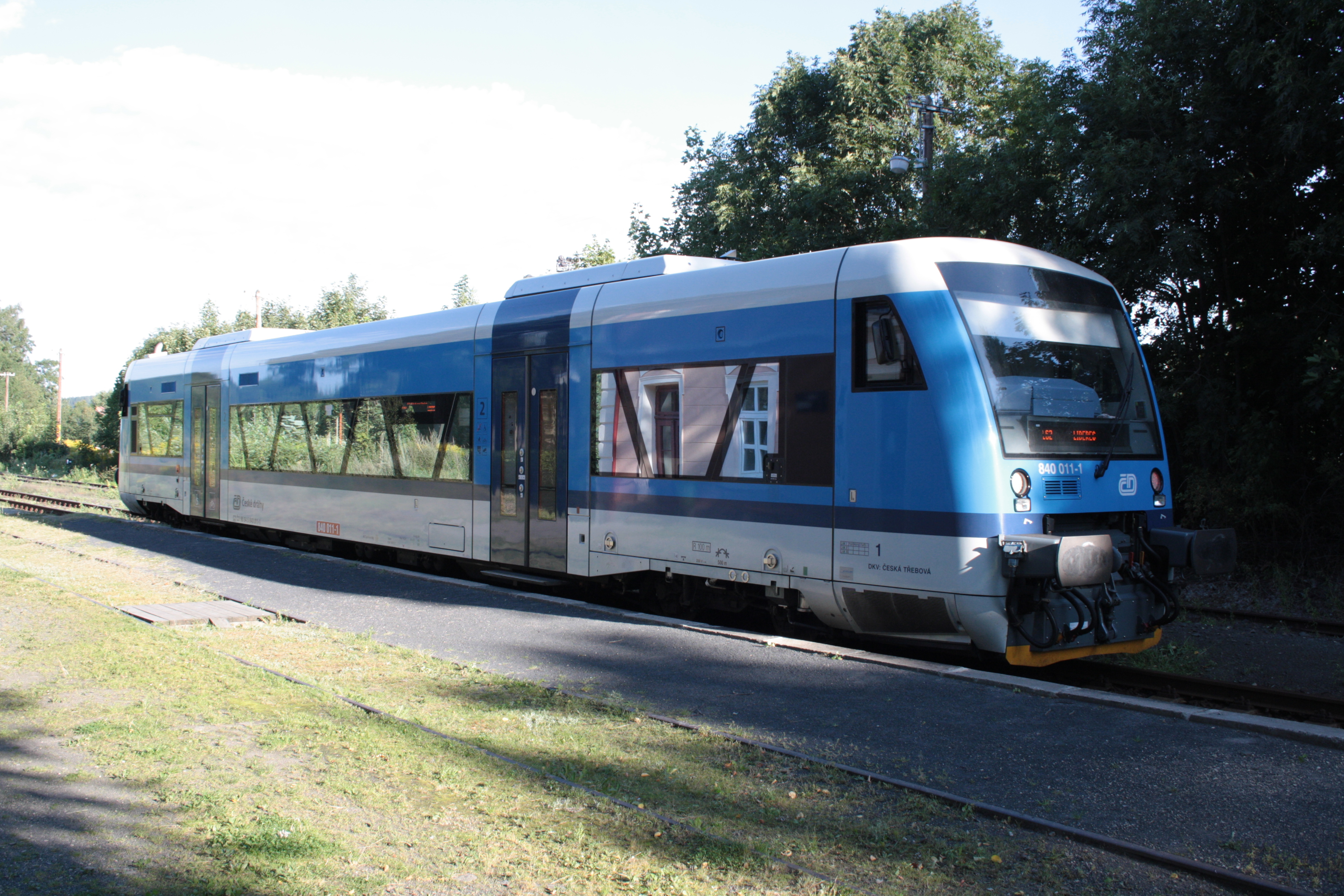 This photograph was taken with a DSLR from WMCZ's Camera grant. Souprava Stadler 840 v železniční zastávce Bílý Potok pod Smrkem.